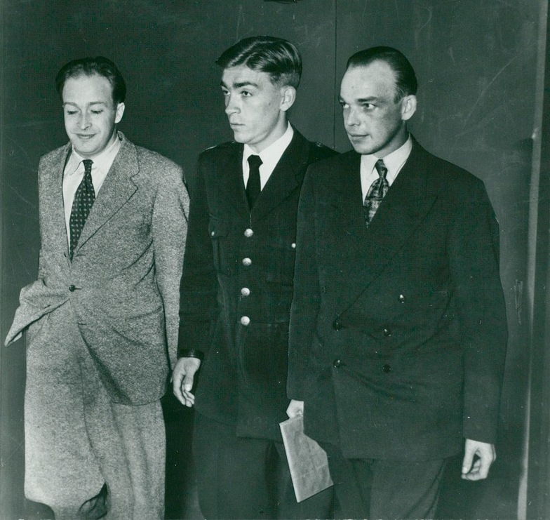 Bröderna Fritiof och Martin Enbom på väg in i rättssalen.